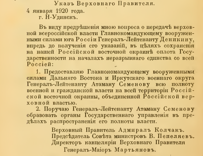 Указ Верховного Правителя Адмирала Колчака от 4 января 1920 года